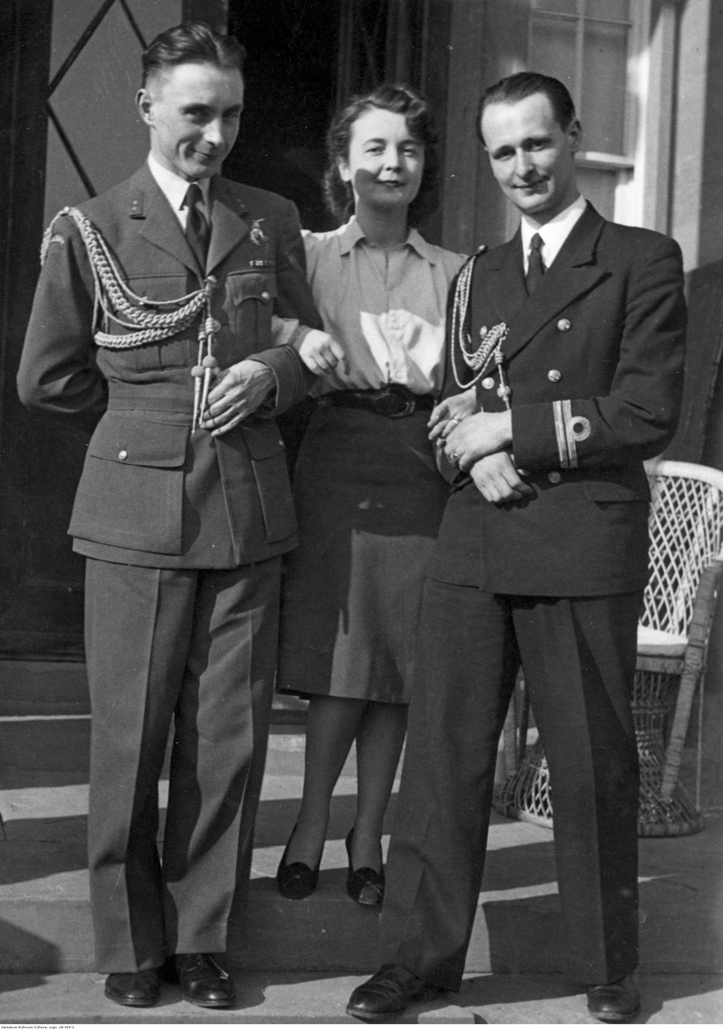 Adiutanci gen. Władysława Sikorskiego por. pilot Czesław Główczyński (z lewej) i por. marynarki Józef Ponikiewski oraz Zofia Leśniowska - córka generała. Archiwum Fotograficzne Czesława Datki. Sygnatura: 18-434-1